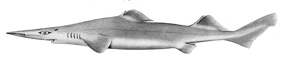 Acanthidium quadrispinosum (= Deania quadrispinosum) -- Longsnout dogfish.